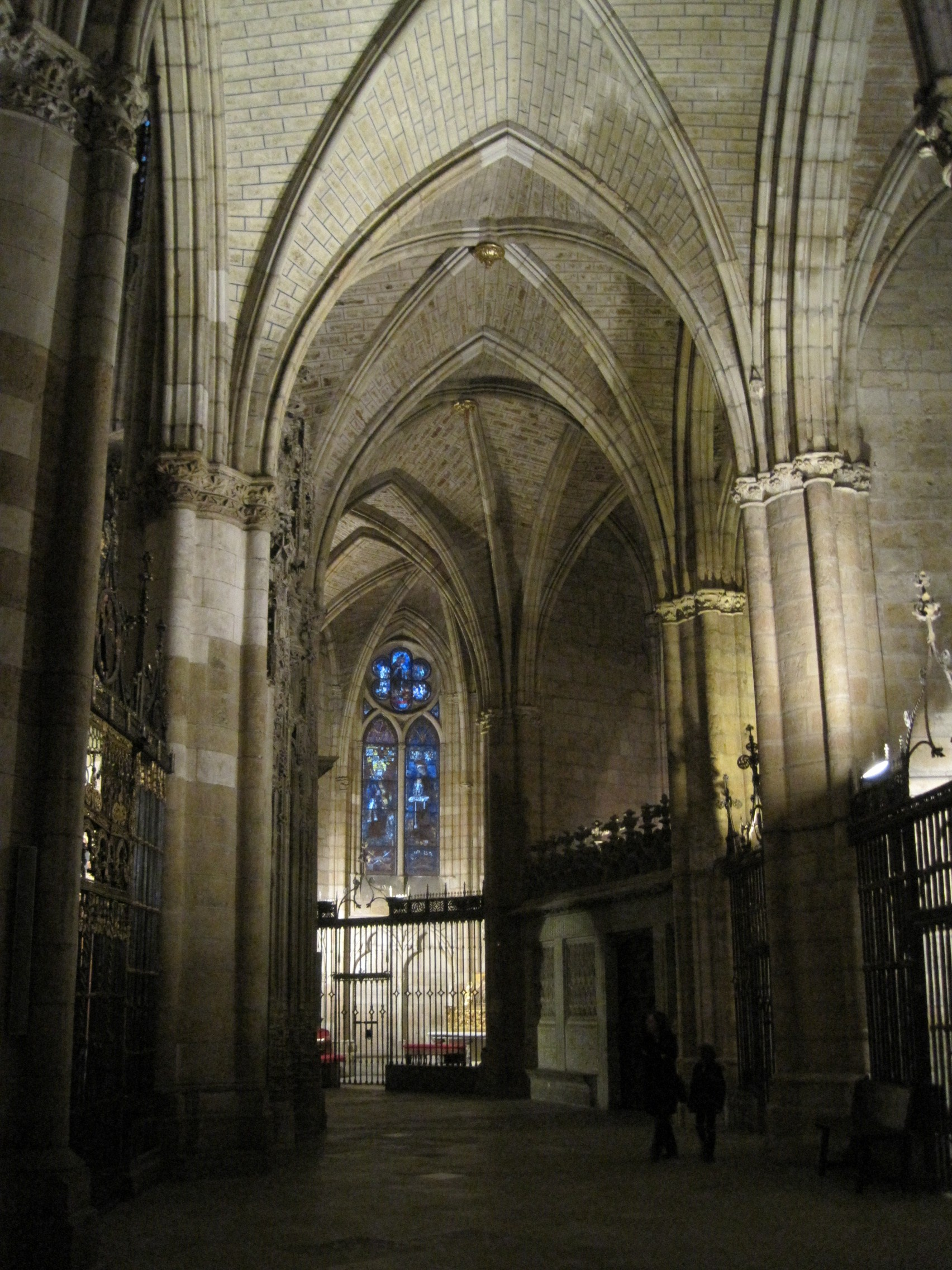 Vista parcial de la girola de la catedral de León (España).